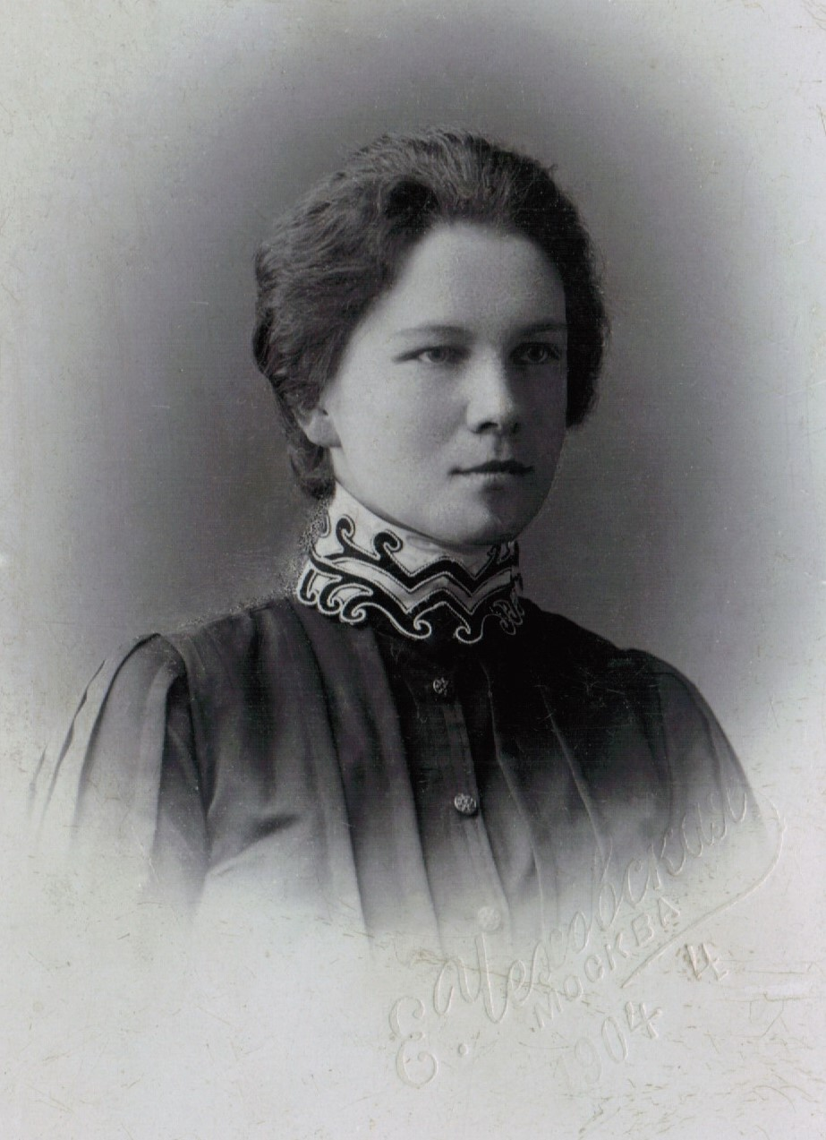 Агния Григориевна Каринская (н.д.-1918), жена Владимира Михайловича Каринского, 2004 год, Москва